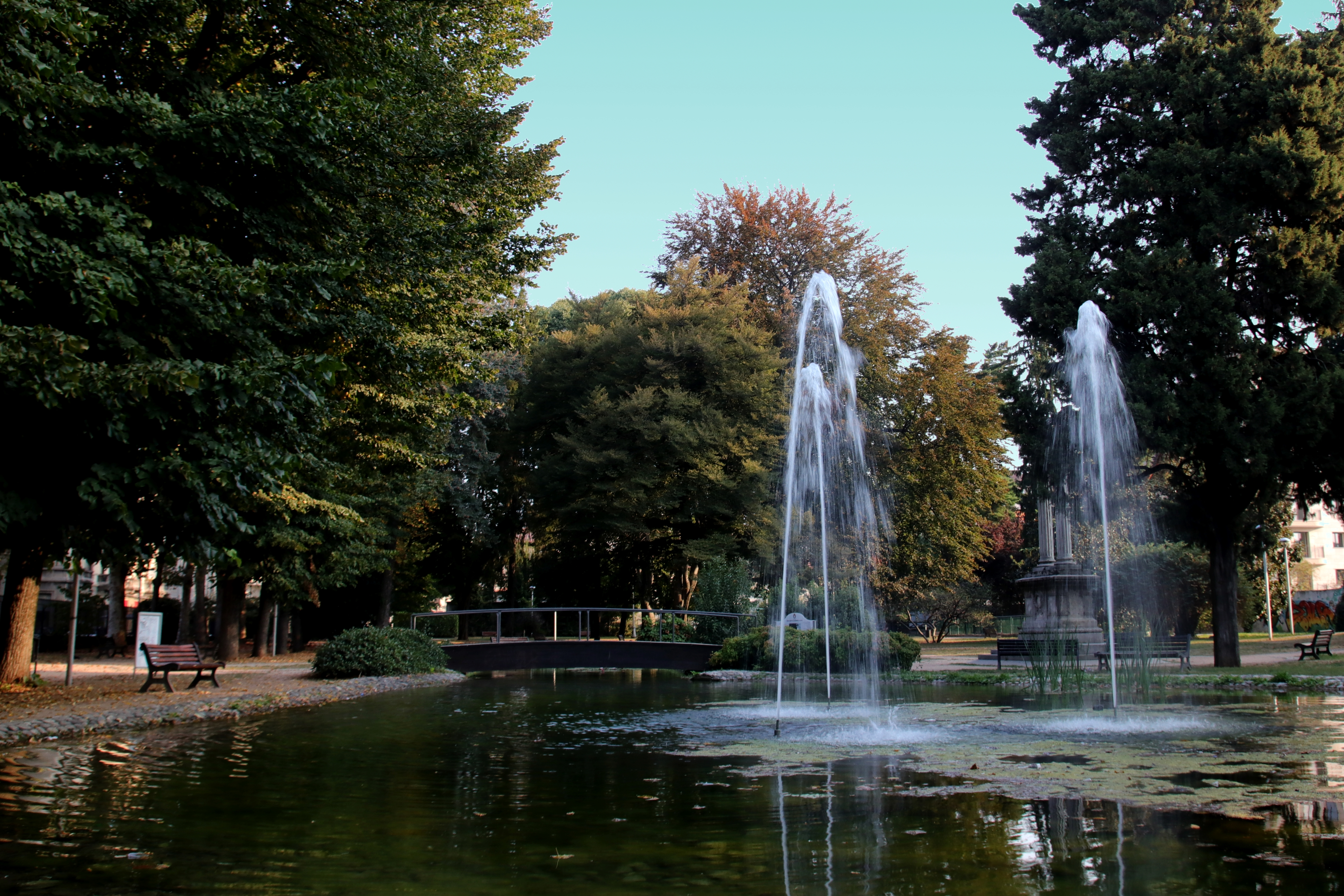 Parco Ugo Foscolo This is a photo of a monument which is part of cultural heritage of Italy.